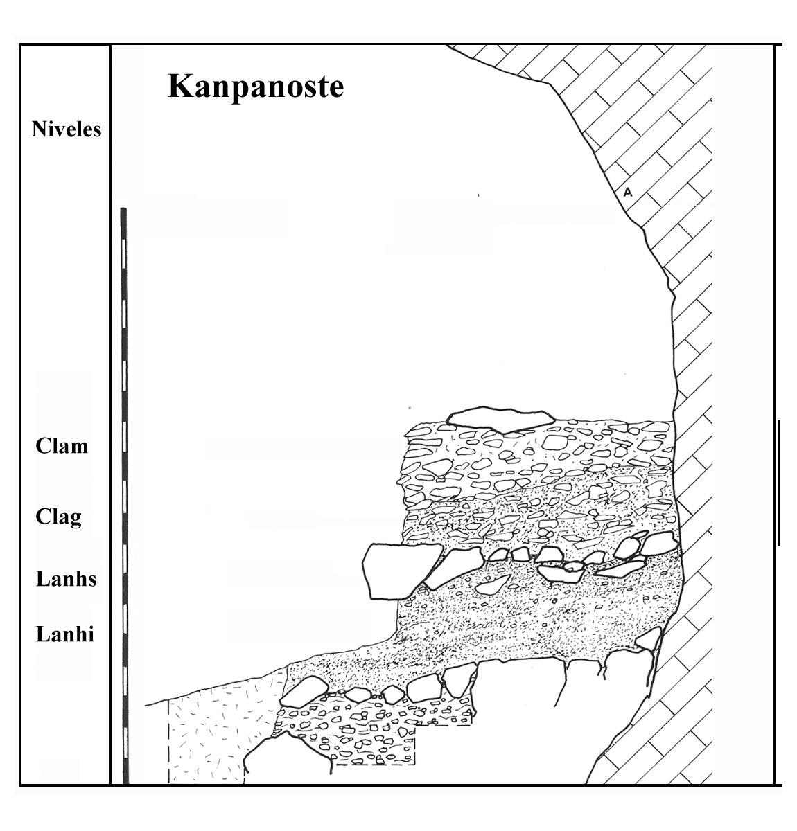 EStratigrafía